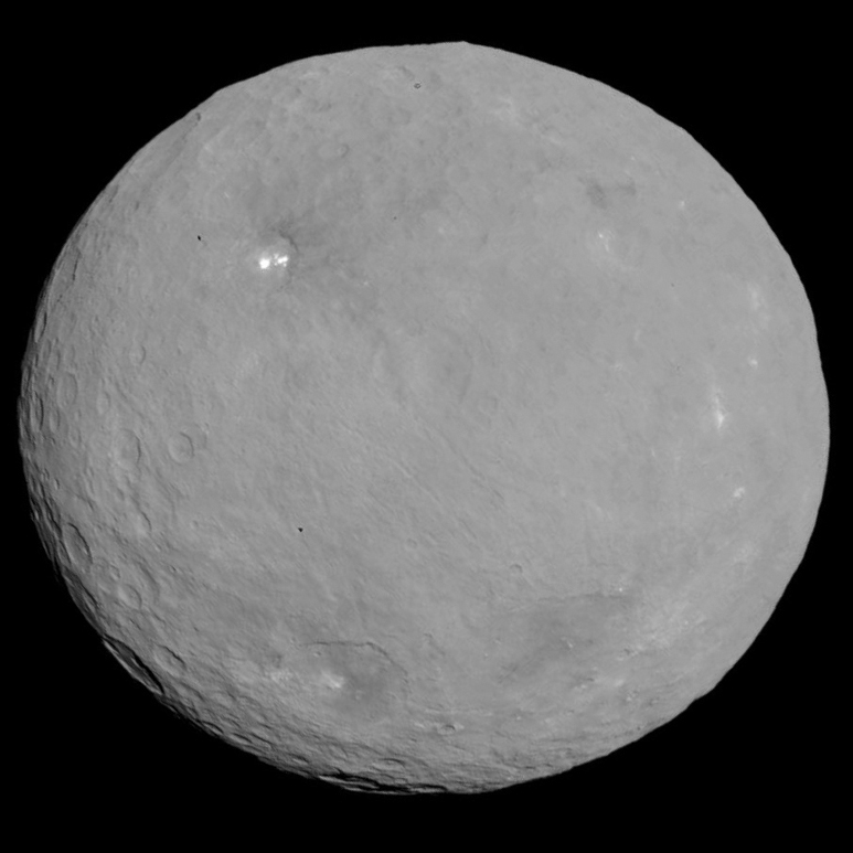 Obraz Ceres ze zdjęć zrobionych 5 i 6 Maja 2015. Dystans 13 600 km.